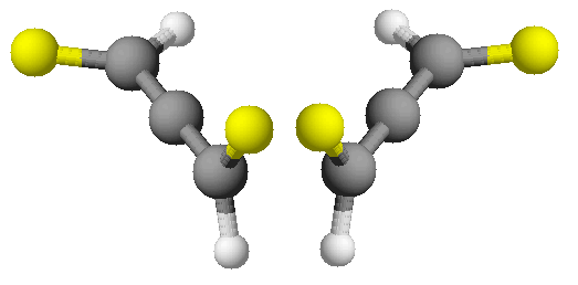 rappresentazione della chiralità prodotta da un asse stereogenico disegnato da Paginazero Categoria:Immagini di chimica